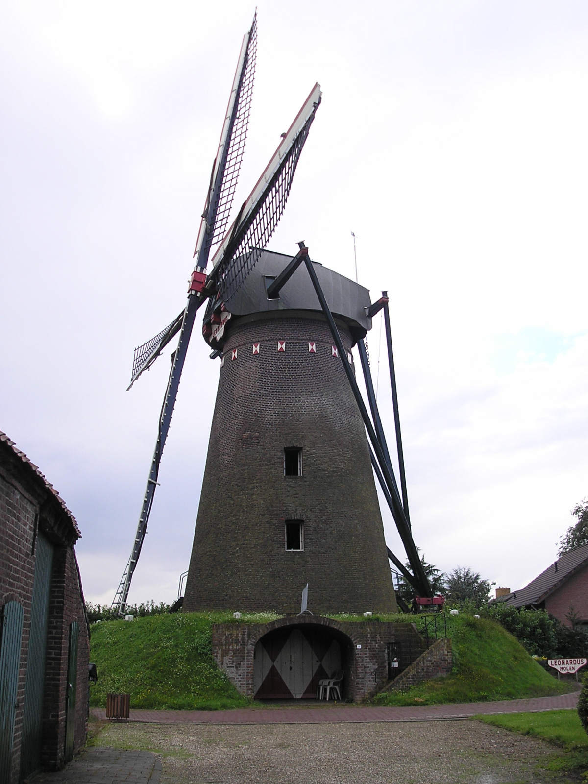 Leonardusmolen - brick windmill 1867 Location: Maasbracht, Limburg, Netherlands Keywords: Windmill, Leonardus --- nl: De Leonardusmolen in Maasbracht. Gebouwd van 1864-1867, gerestaureerd in 1997. Locatie: Maasbracht, Limburg, Nederland Trefwoorden: Beltmolen, rond, baksteen, dakleer, graan